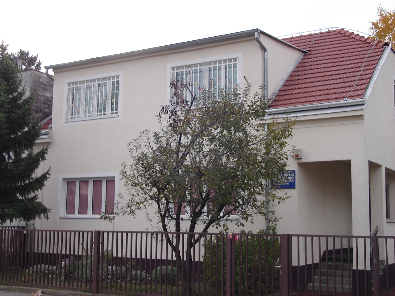 Фотографија: Кућа у Дубрави где је одржана Пета земаљска конференција КПЈ Датум: 13. новембар 2009. године Аутор: Пламен